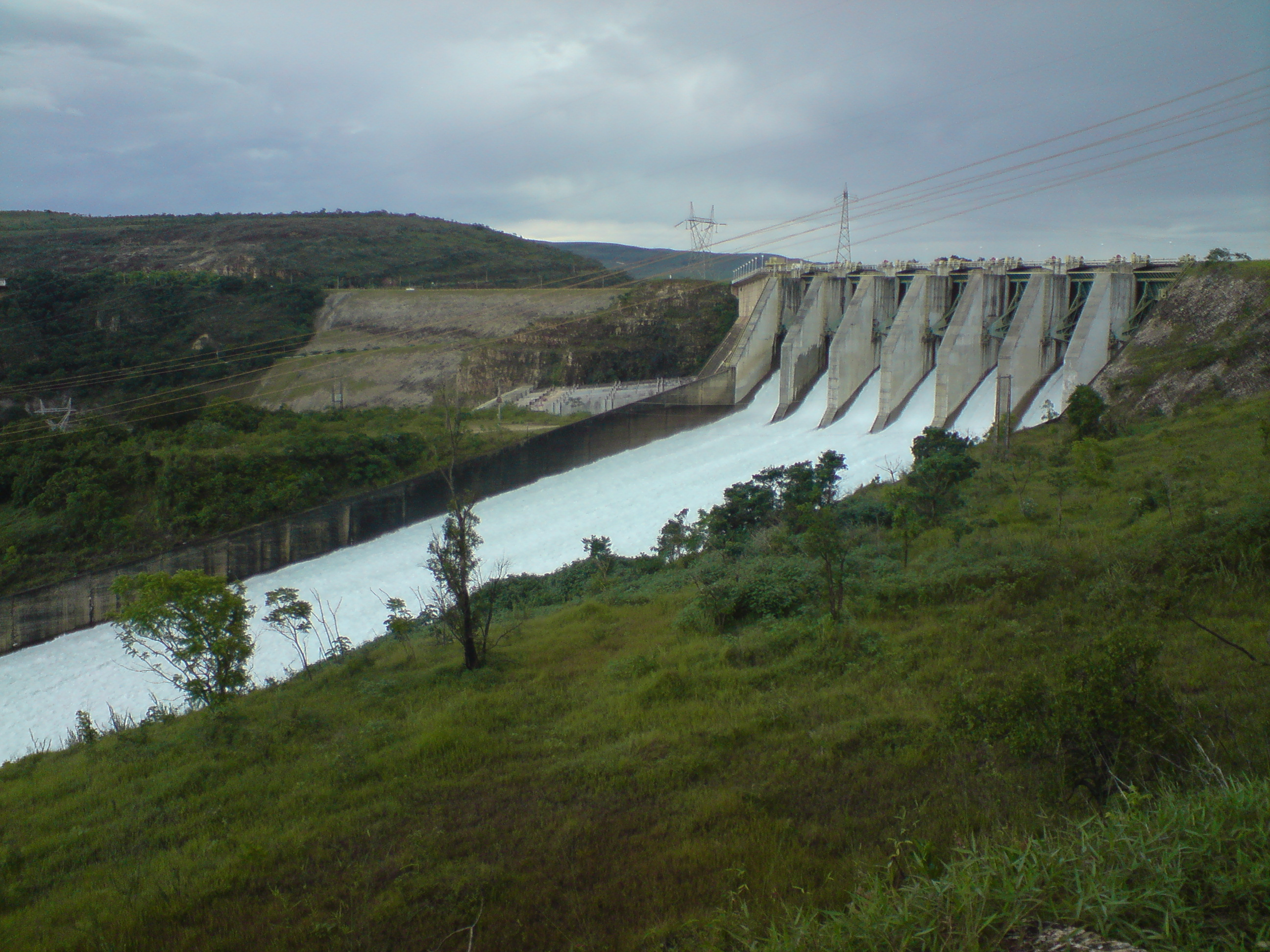 Usina Hidroelétrica Furnas - Janeiro/2009